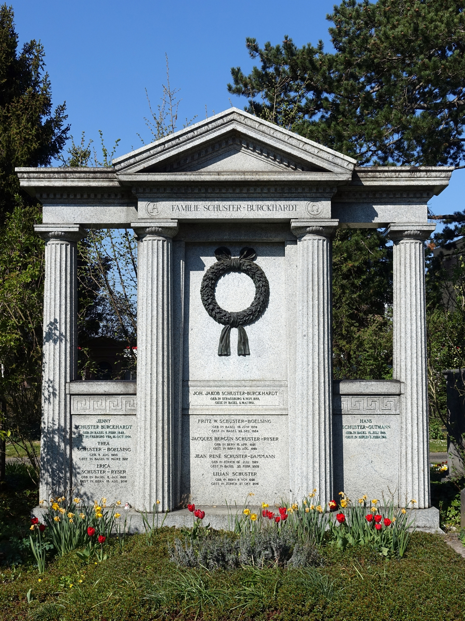 Johann Jakob Schuster-Burckhardt (1838–1901) Bankier Familien Grab auf dem Friedhof Wolfgottesacker, Basel